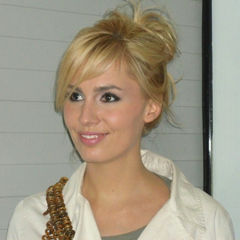 Agnieszka Popielewicz, dziennikarka i prezenterka telewizyjna. Zdjęcie zrobione podczas Eska Music Awards 2011 w katowickim Spodku.